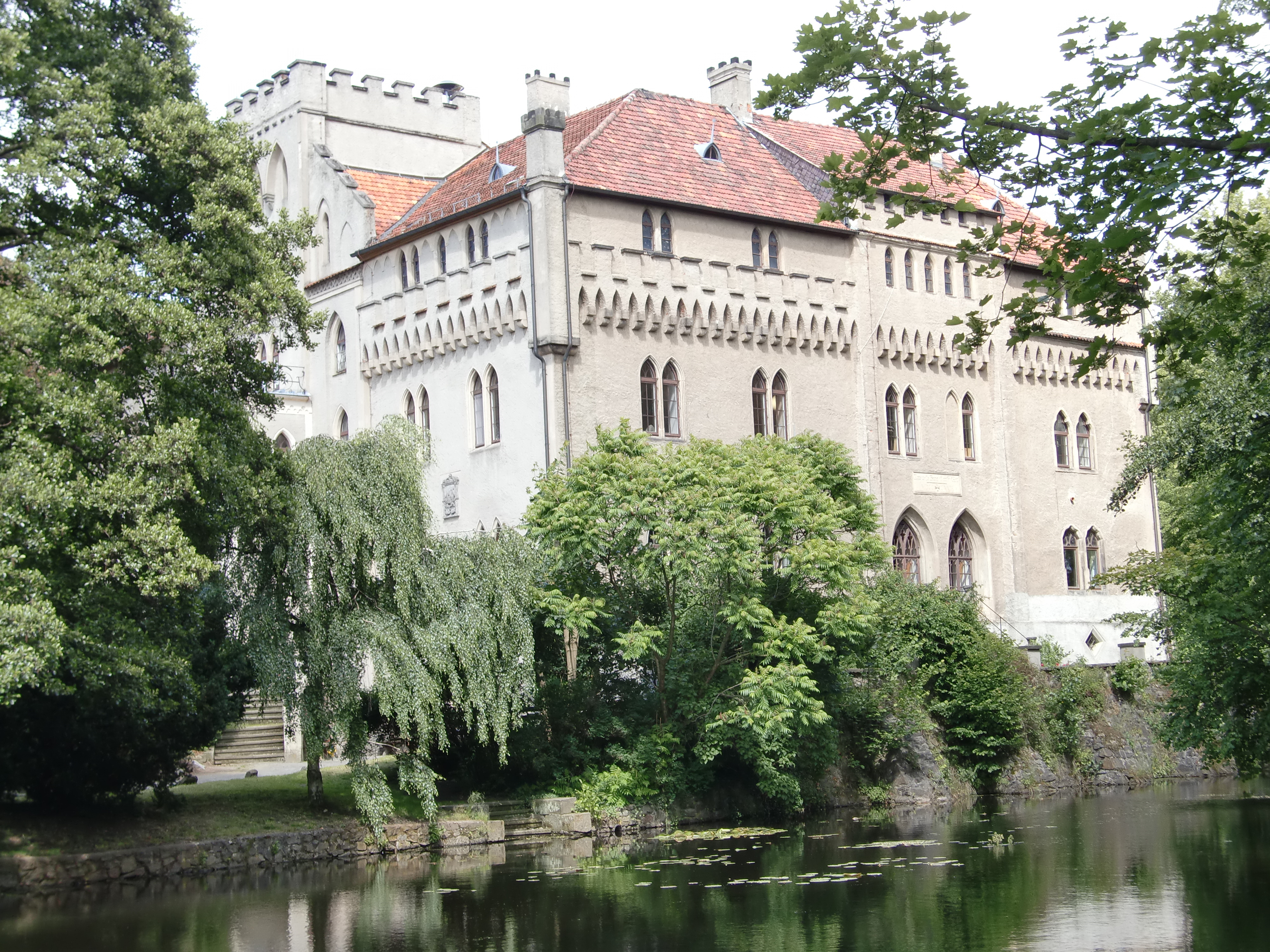 Castle in Seifersdorf (Wachau)